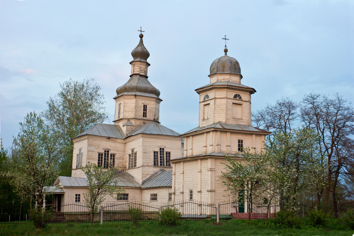 Церква Успіння Пресвятої Богородиці у Волосківцях